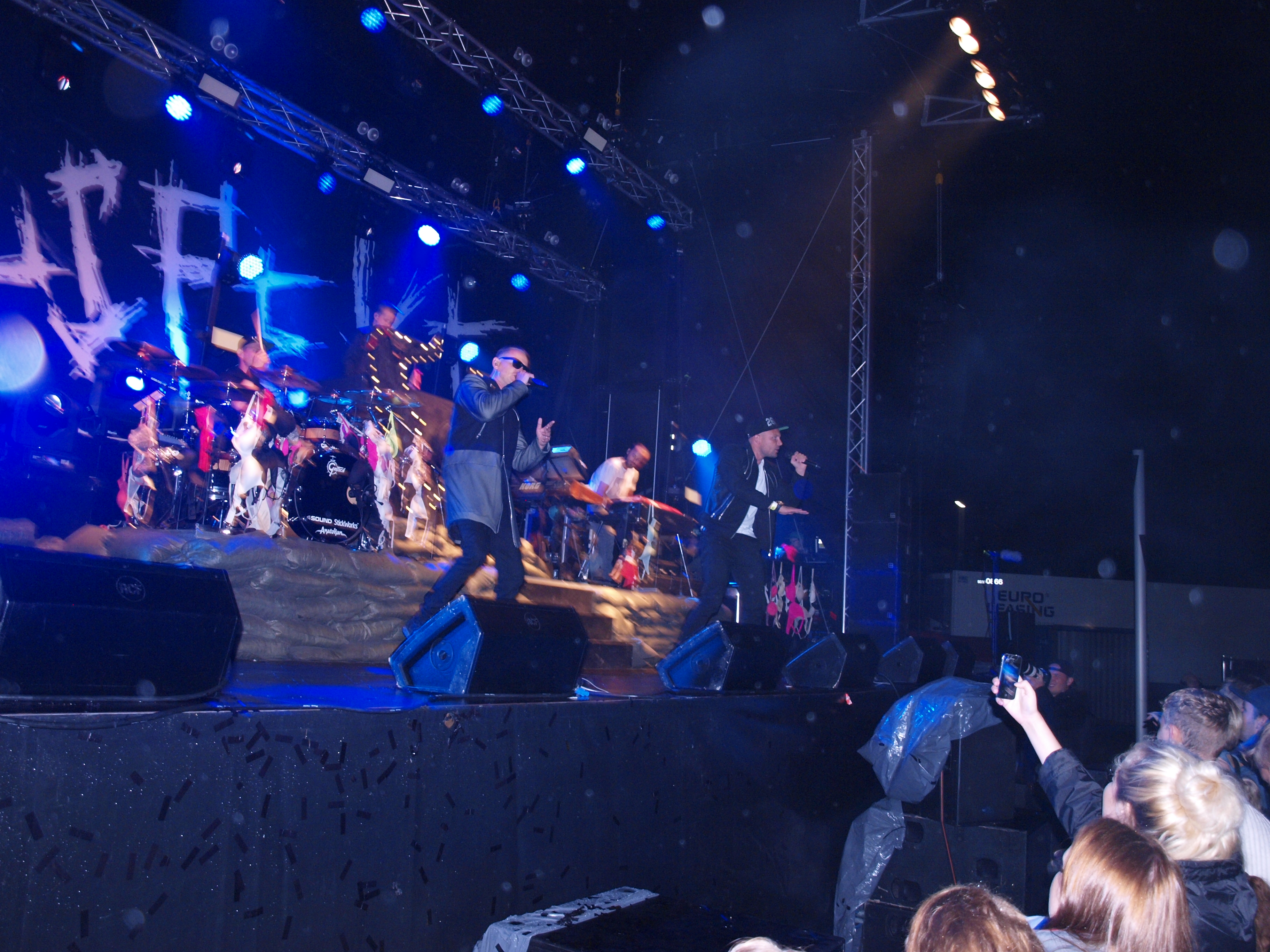 Suspekt under koncerten Studierock i Kolding, 4. september 2015